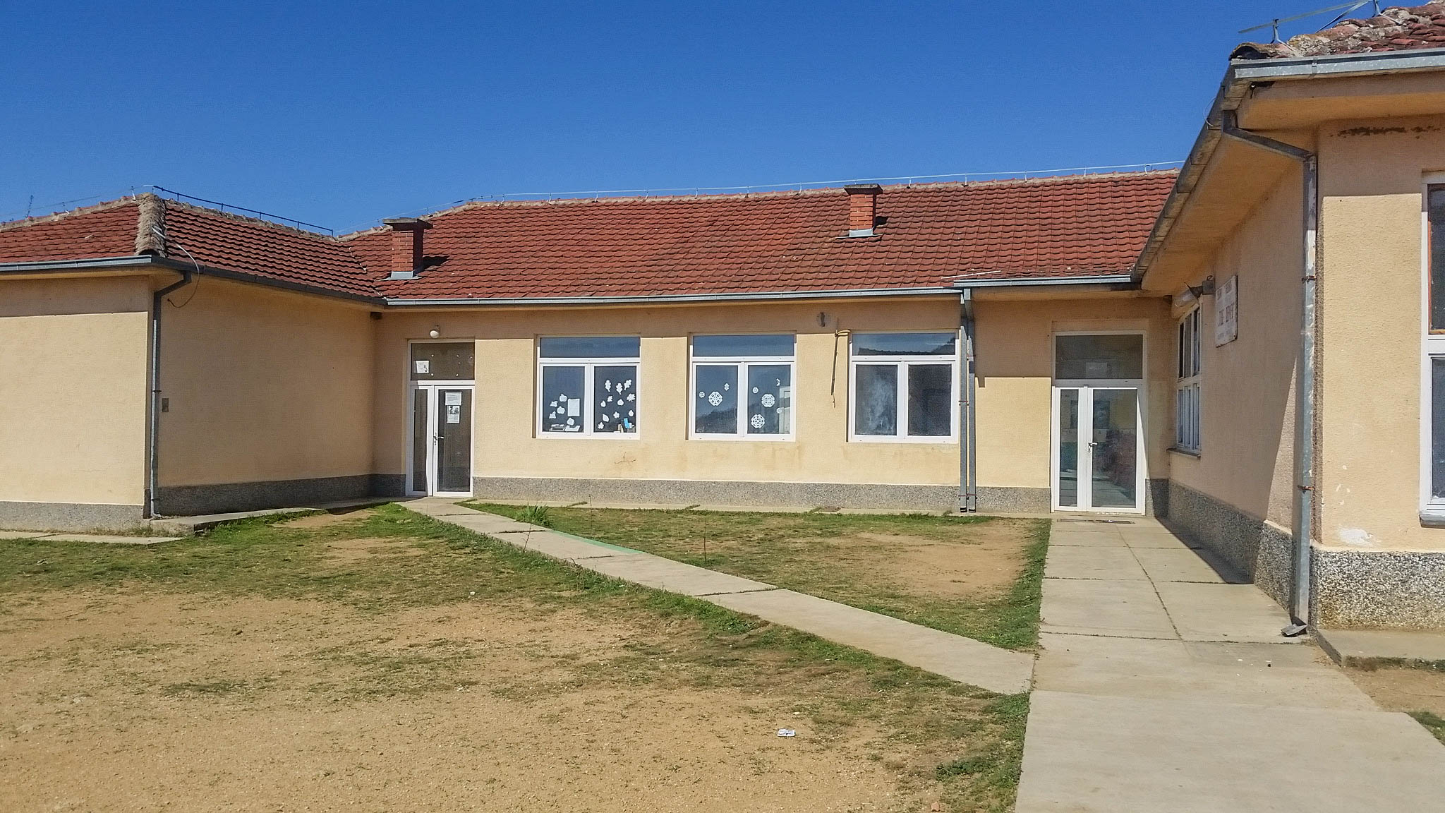 Основно училиште „Гоце Делчев“ - Дрвош